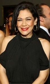 Mariasela Álvarez en la premier de la dominicana película Lotoman 2.0.